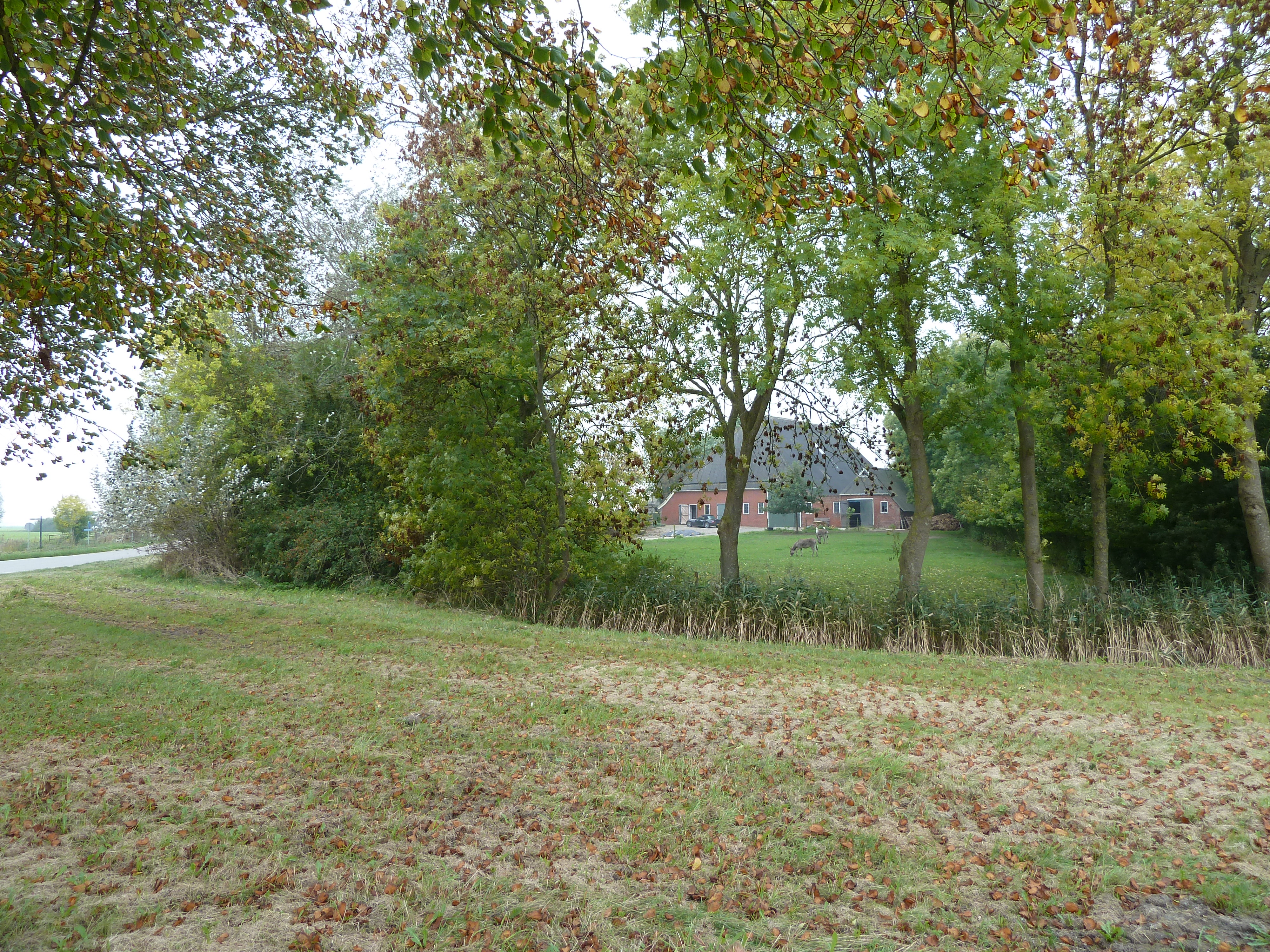 Aalsum.